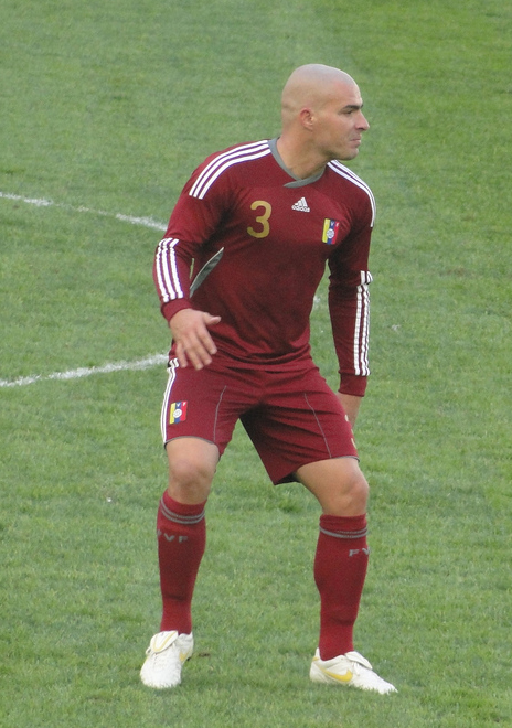 José Manuel Rey en la Copa América 2011.